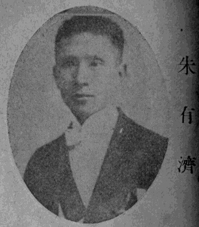 中文（台灣）: 民國名人圖鑑肖像